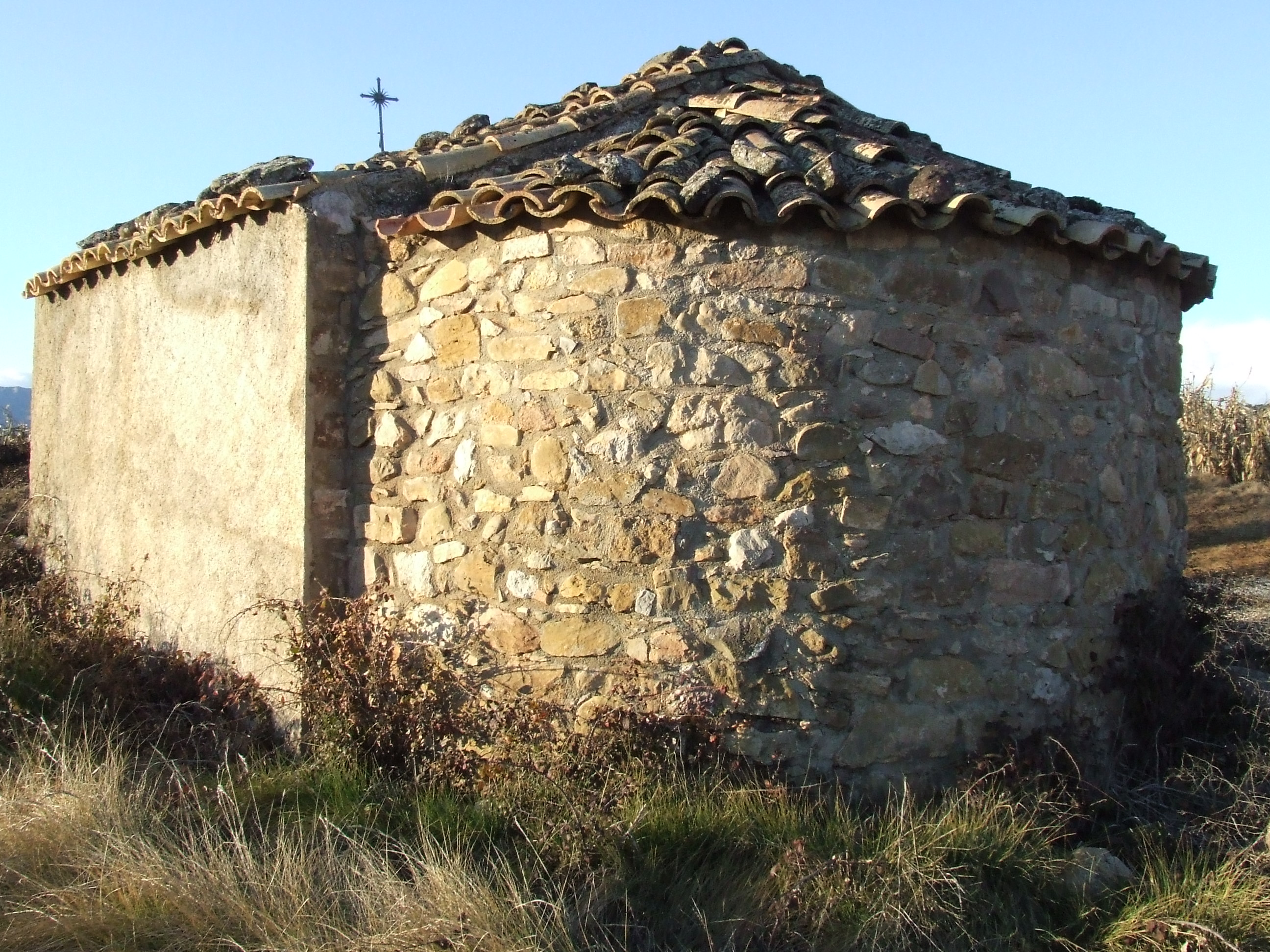 Absis de Santa Llúcia de Vilamitjana (Tremp, Pallars Jussà)